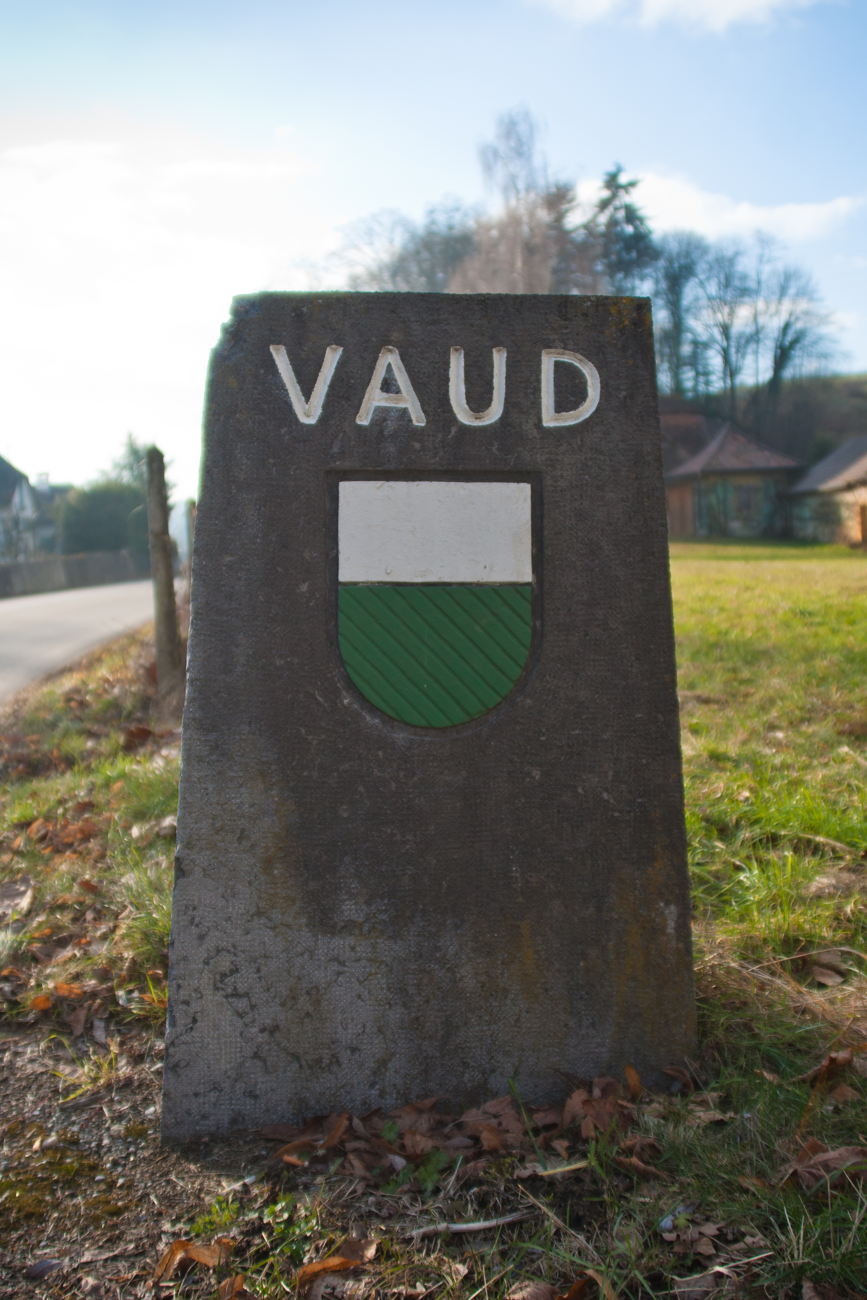 Borne d'entrée dans le canton de Vaud. Guévaux, limite Fribourg/Vaud.